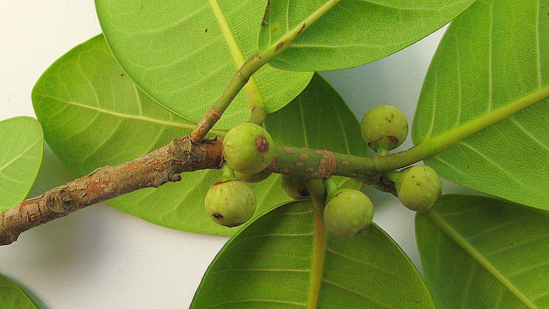 Ficus bahiensis C.C.Berg & Carauta